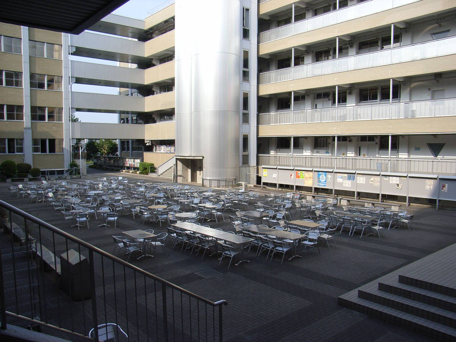 中庭／オープンキャンパス時